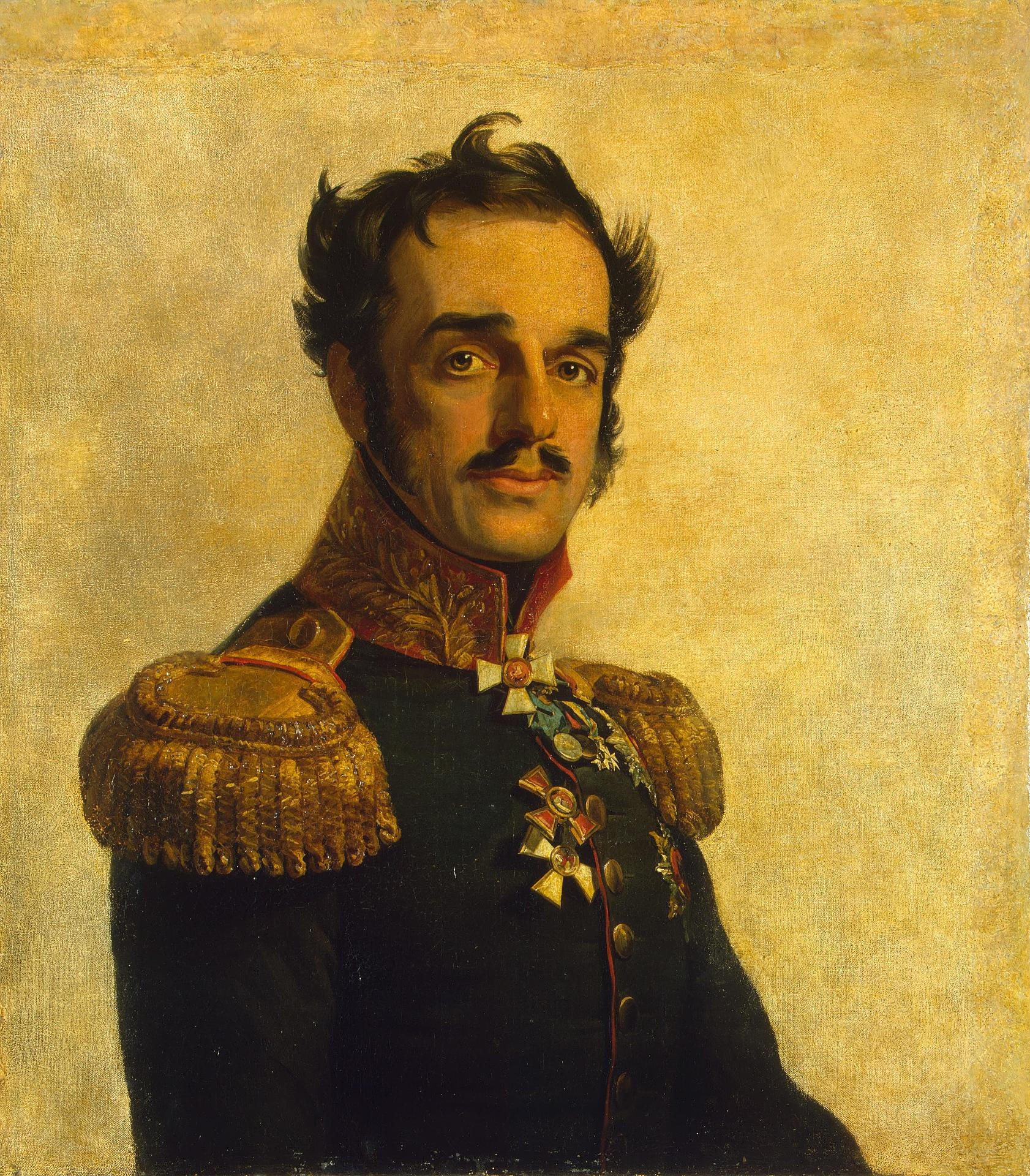 Ivan Osipovich de Witt (1781–1840) russian general